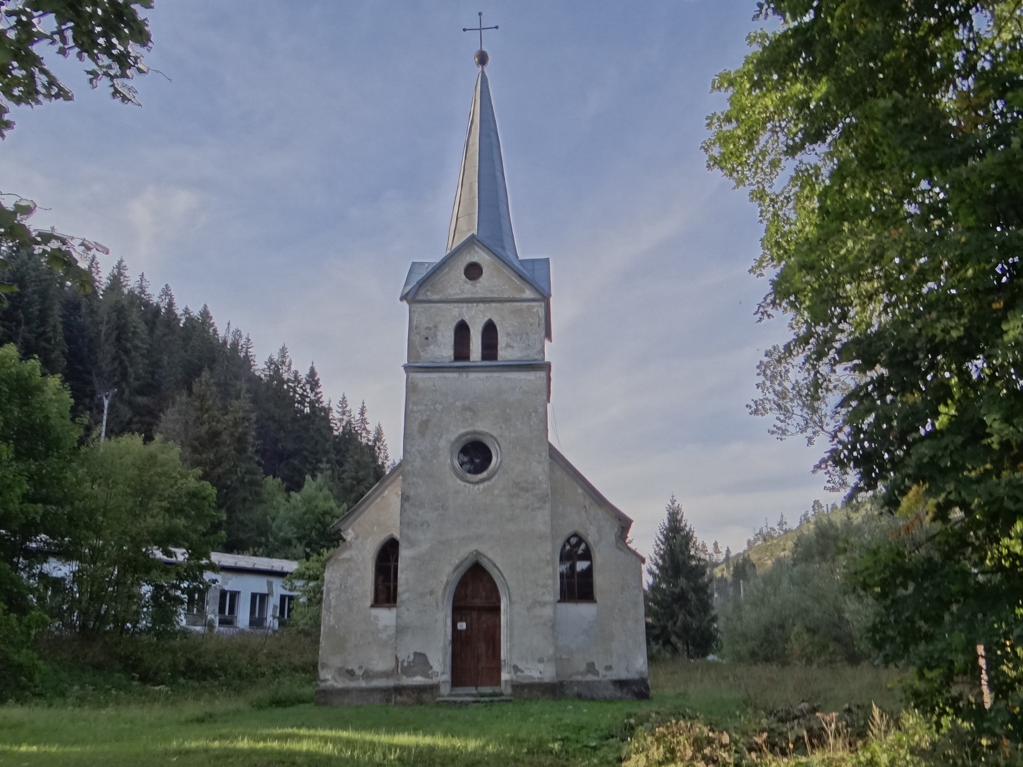 Mlynky, okres Spišská Nová Ves, Košický kraj, Slovensko.